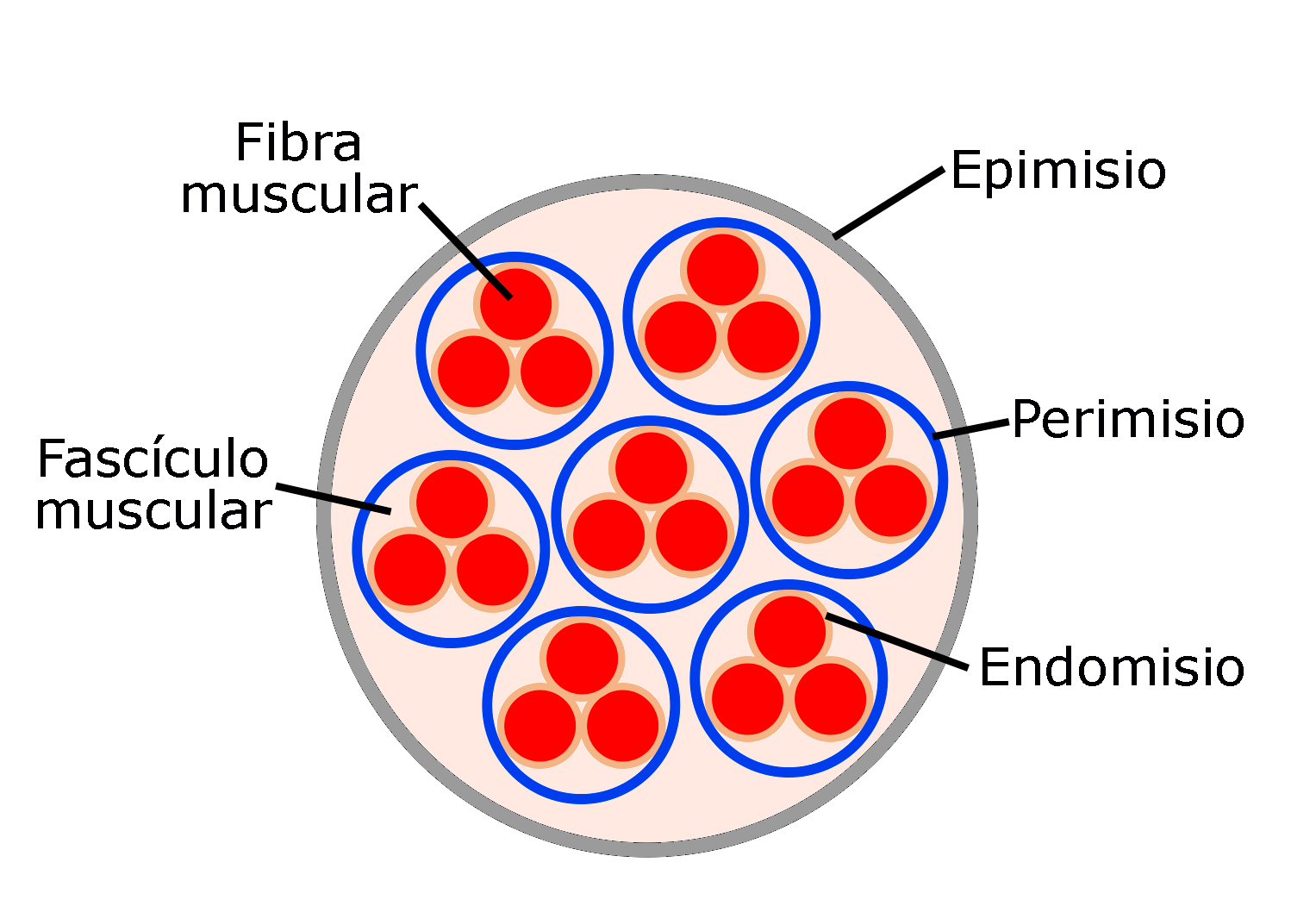 Esquema de una sección de músculo estriado en la que se observa el endomisio, perimisio y epimisio.